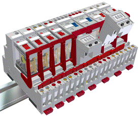 Fotografia que realizamos a un conjunto de relés de Relequick montados sobre sus correspondientes bases de conexión tipo interface a Rail DIN para mas información visitar